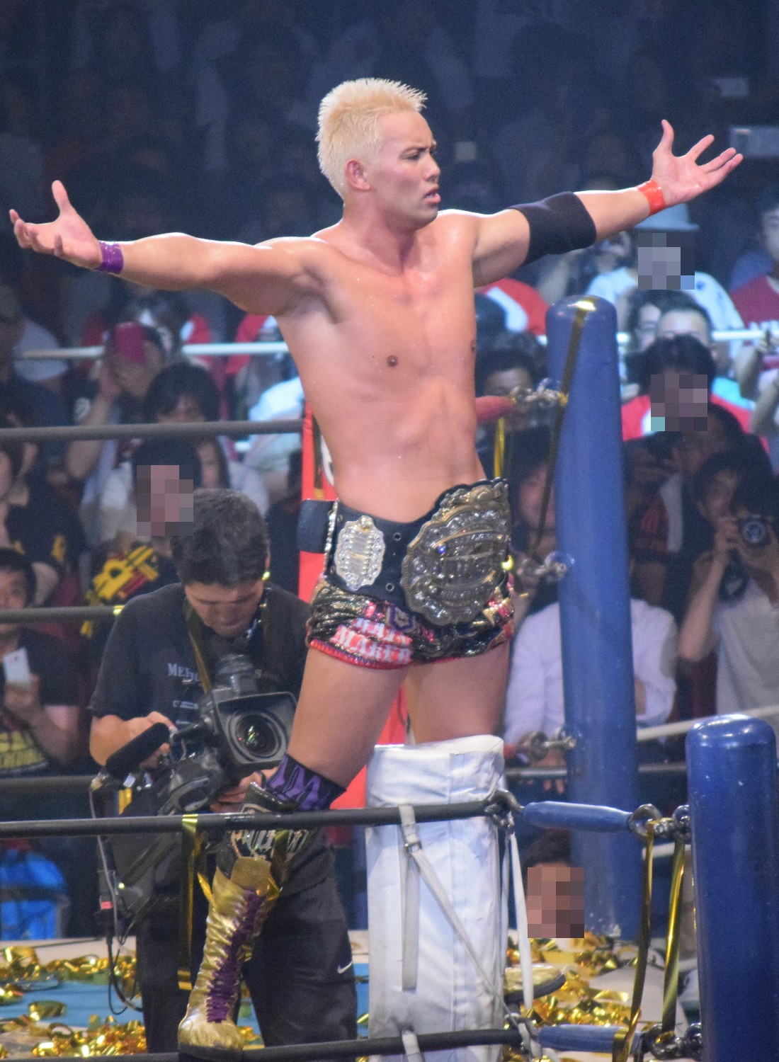 2015年7月5日 大阪城ホール 「DOMINION 7.5 in OSAKA-JO HALL」 オカダ・カズチカ